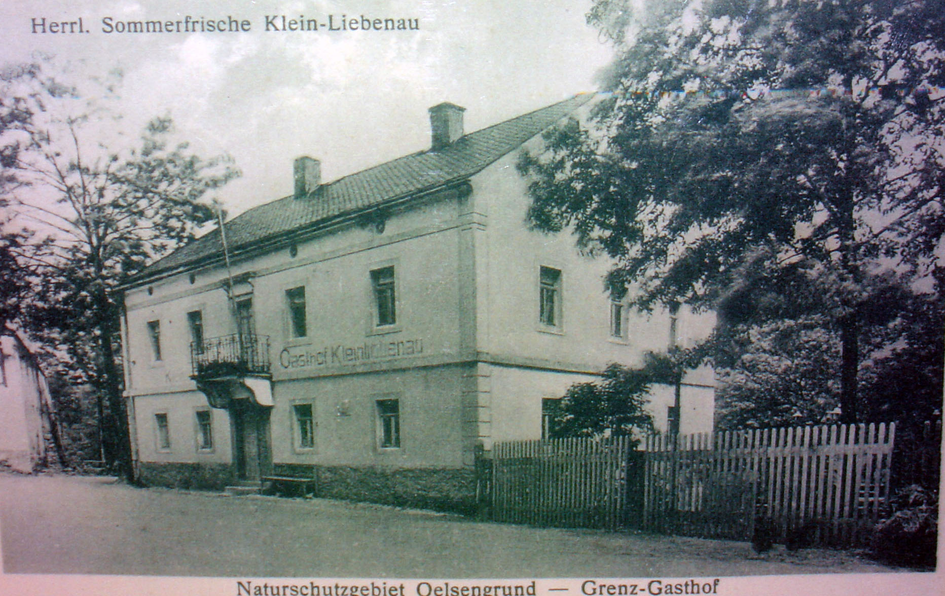 Blick vom Kirchturm über Breitenau